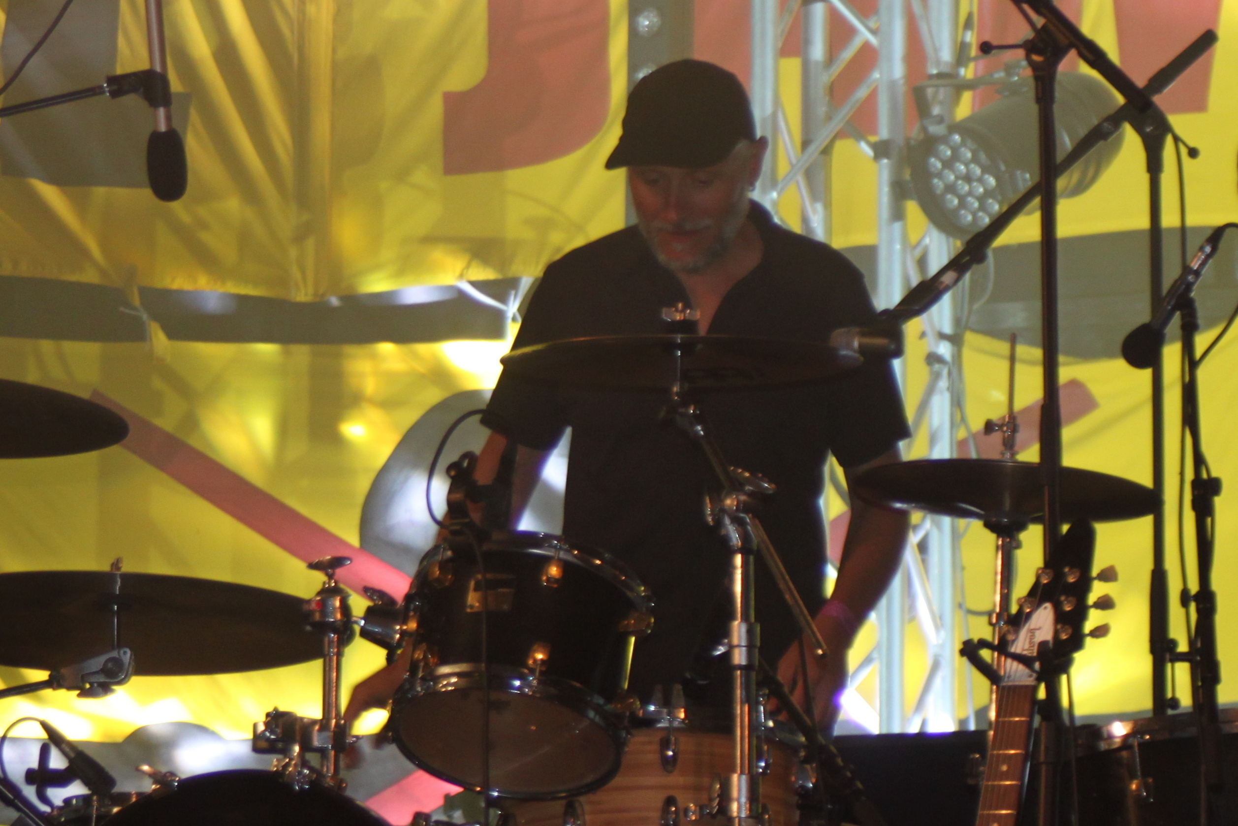 Xavier Mesa, Parabellum, à la ZàD, le 4 août 2013, Fr-44-Notre-Dame-des-Landes.